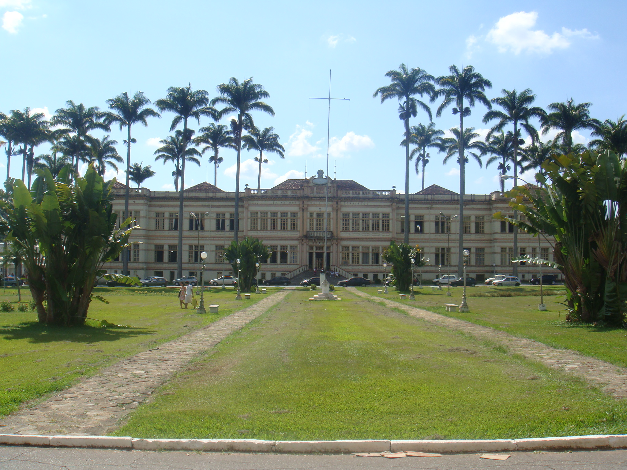 Pangasinan: Prédio Principal da Universidade Federal de Viçosa, inaugurado em 1926